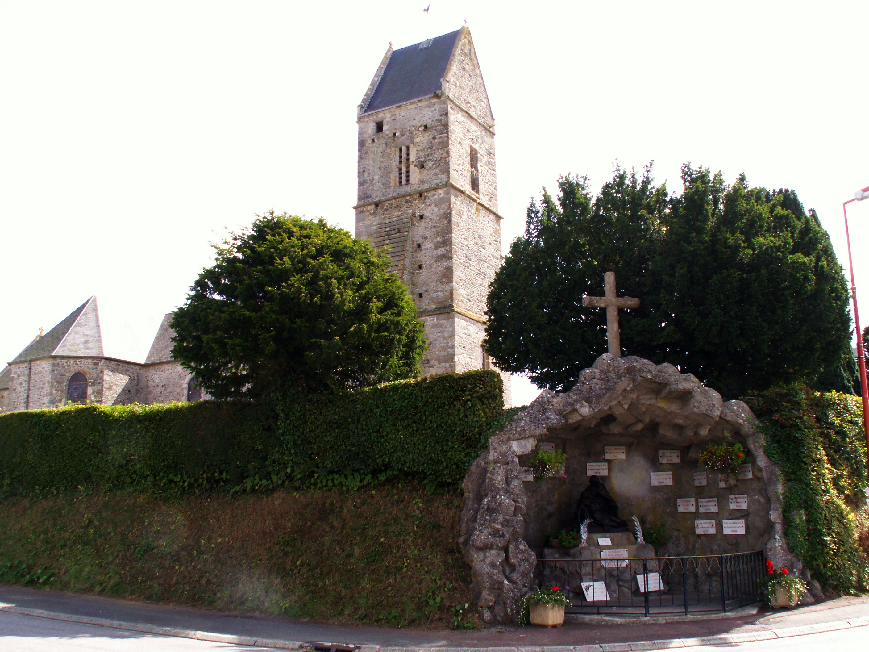 Eglise de la Rondehaye, Manche, France